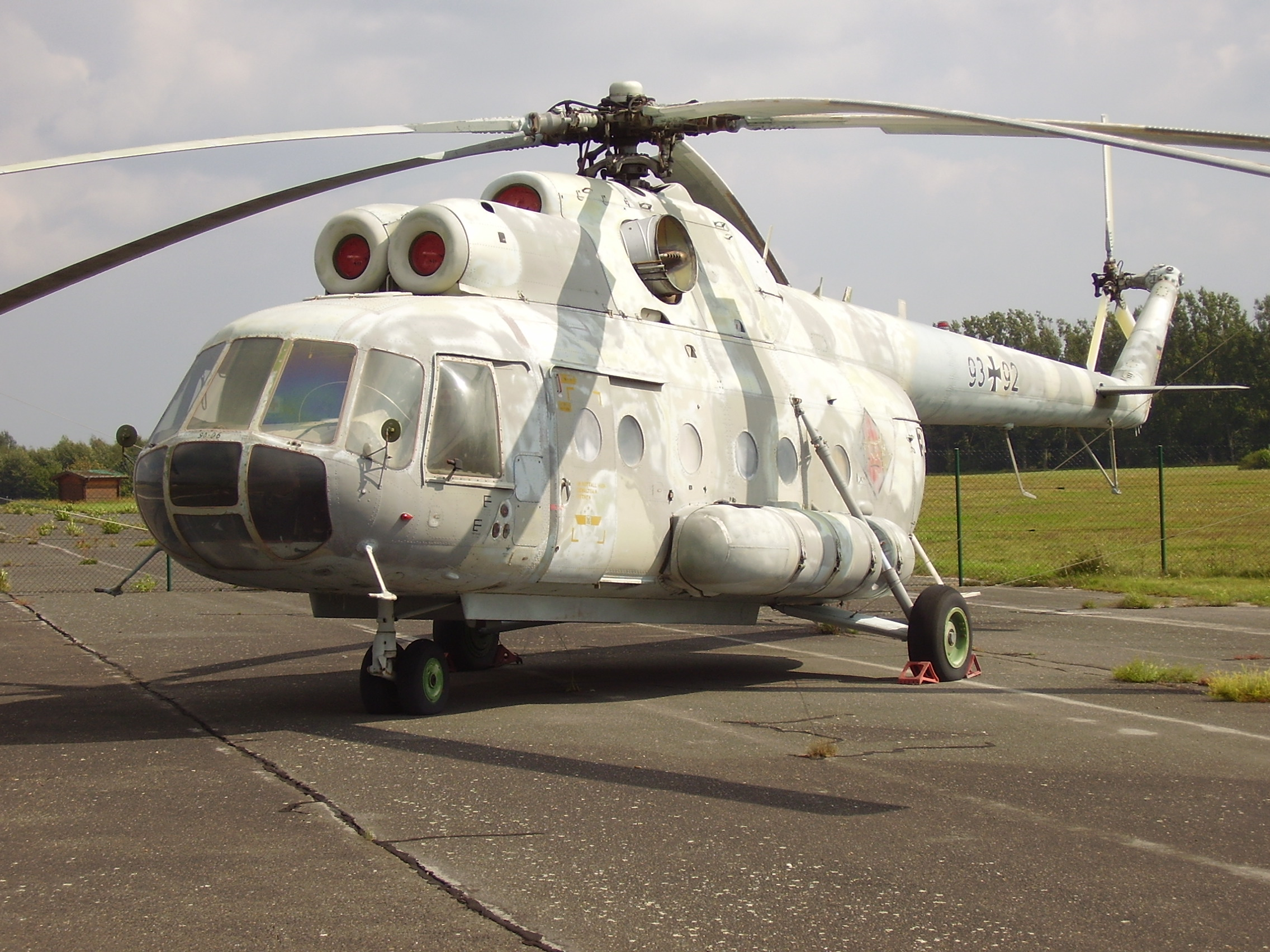 Luftwaffenmuseum der Bundeswehr; Airforce Museum of the Bundeswehr; Berlin-Gatow